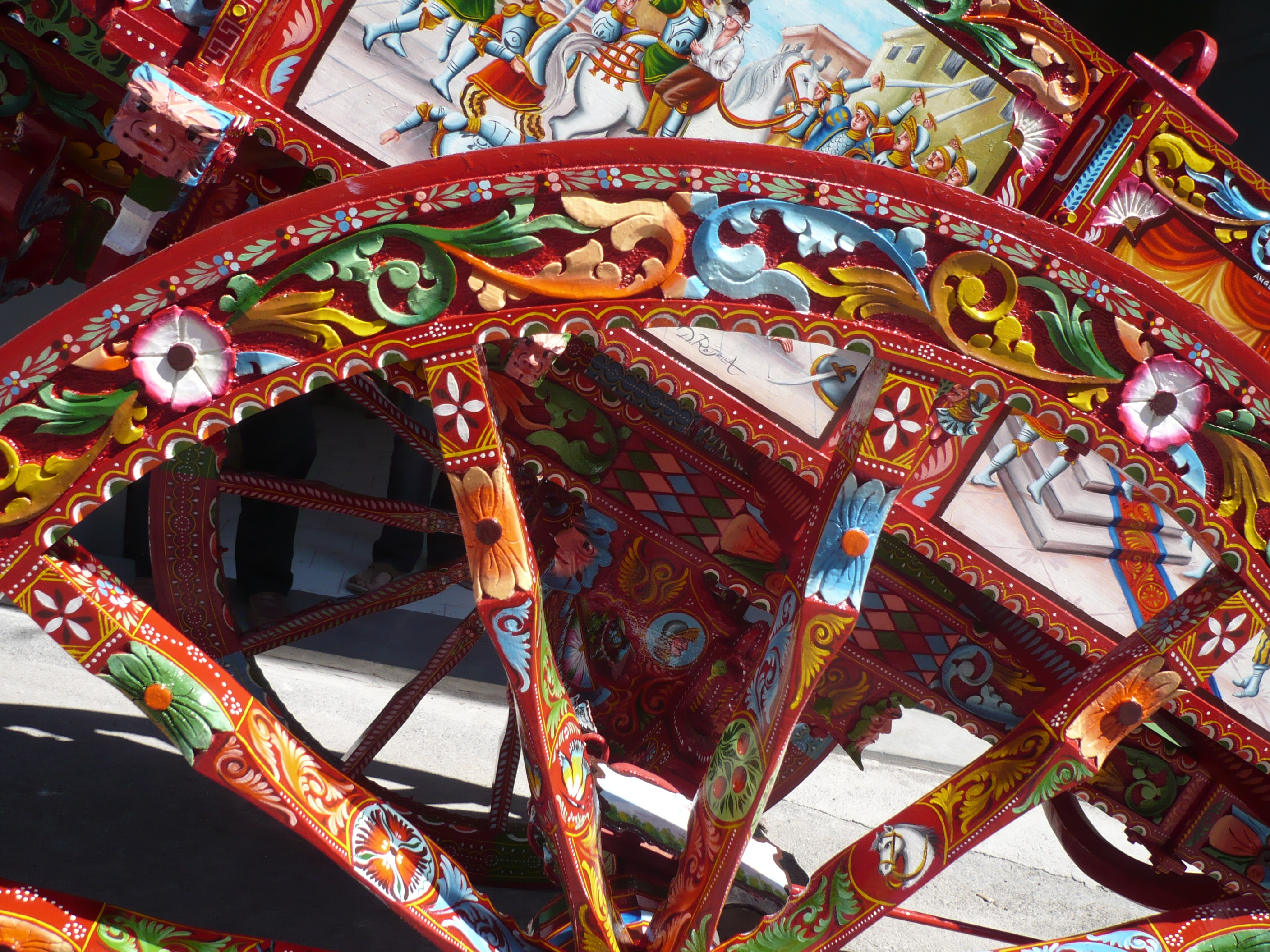 Particolare di un carretto siciliano. Pittura ad opera del maestro Damiano Rotella.